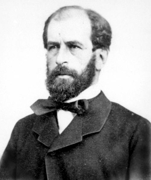 Federico Errázuriz Zañartu (Santiago; 25 de abril de 1825 - † 20 de julio de 1877), Presidente de Chile (1871-1876)